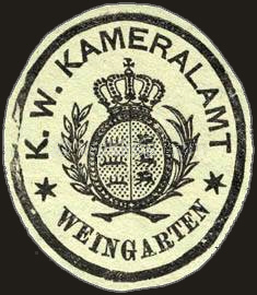 Königlich Württembergisches Kameralamt Weingarten, Briefsiegel